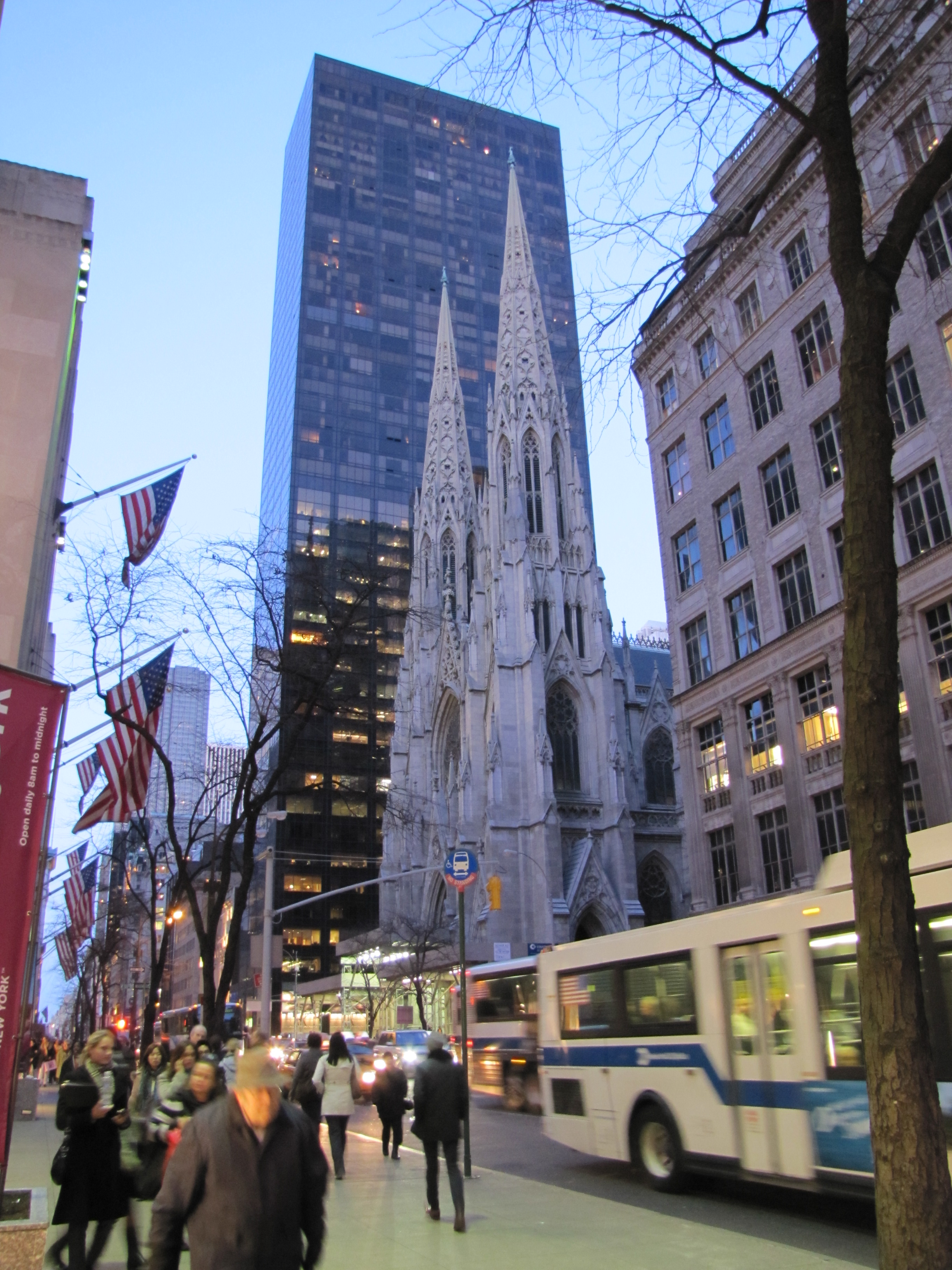 Antiguo vs Moderno